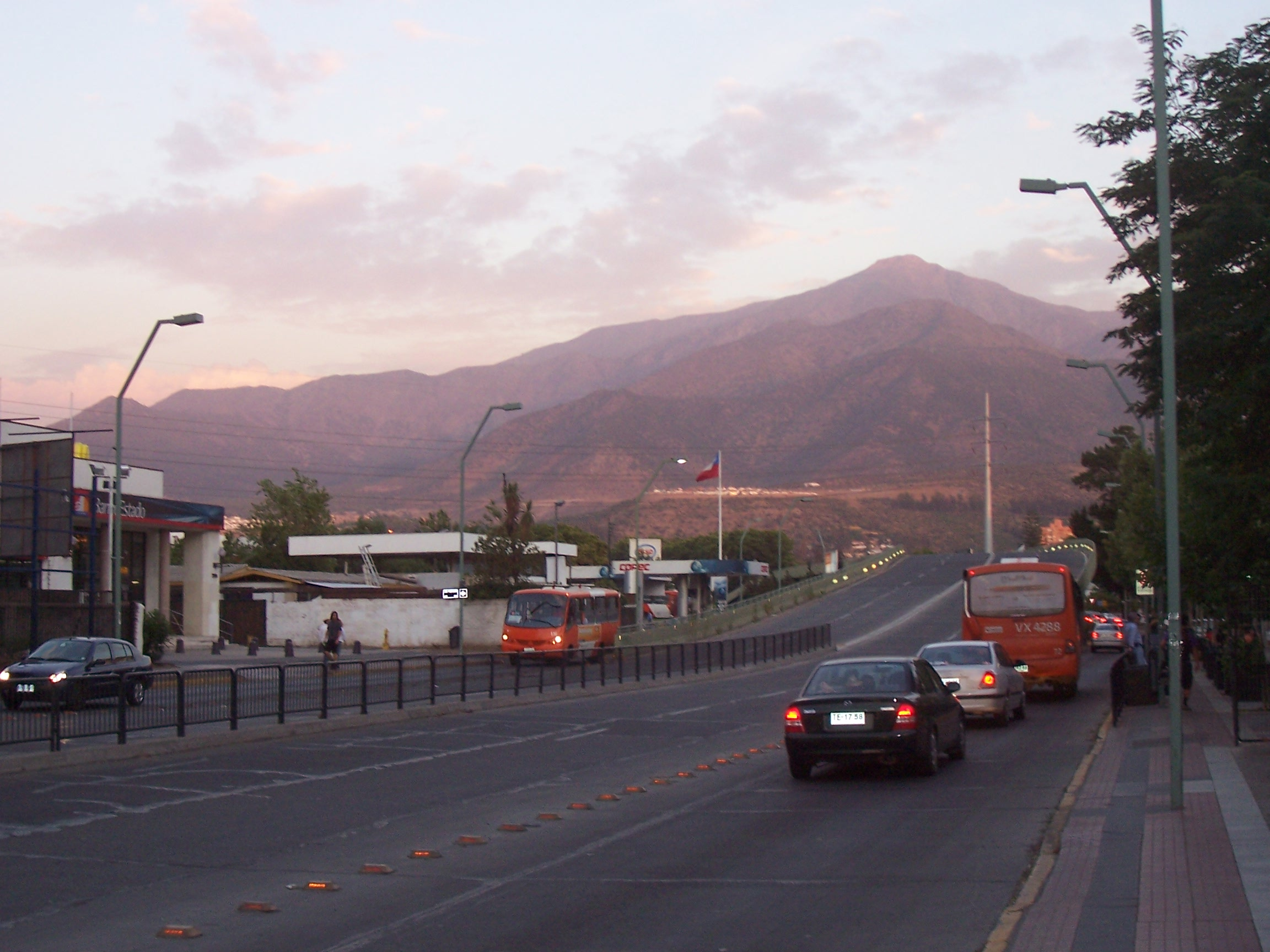 La avenida Cristóbal Colón en su paso por la Rotonda Atenas, en la comuna de Las Condes, Santiago de Chile.